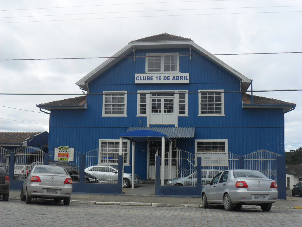 Clube 16 de Abril, em Itaiópolis, julho de 2013.